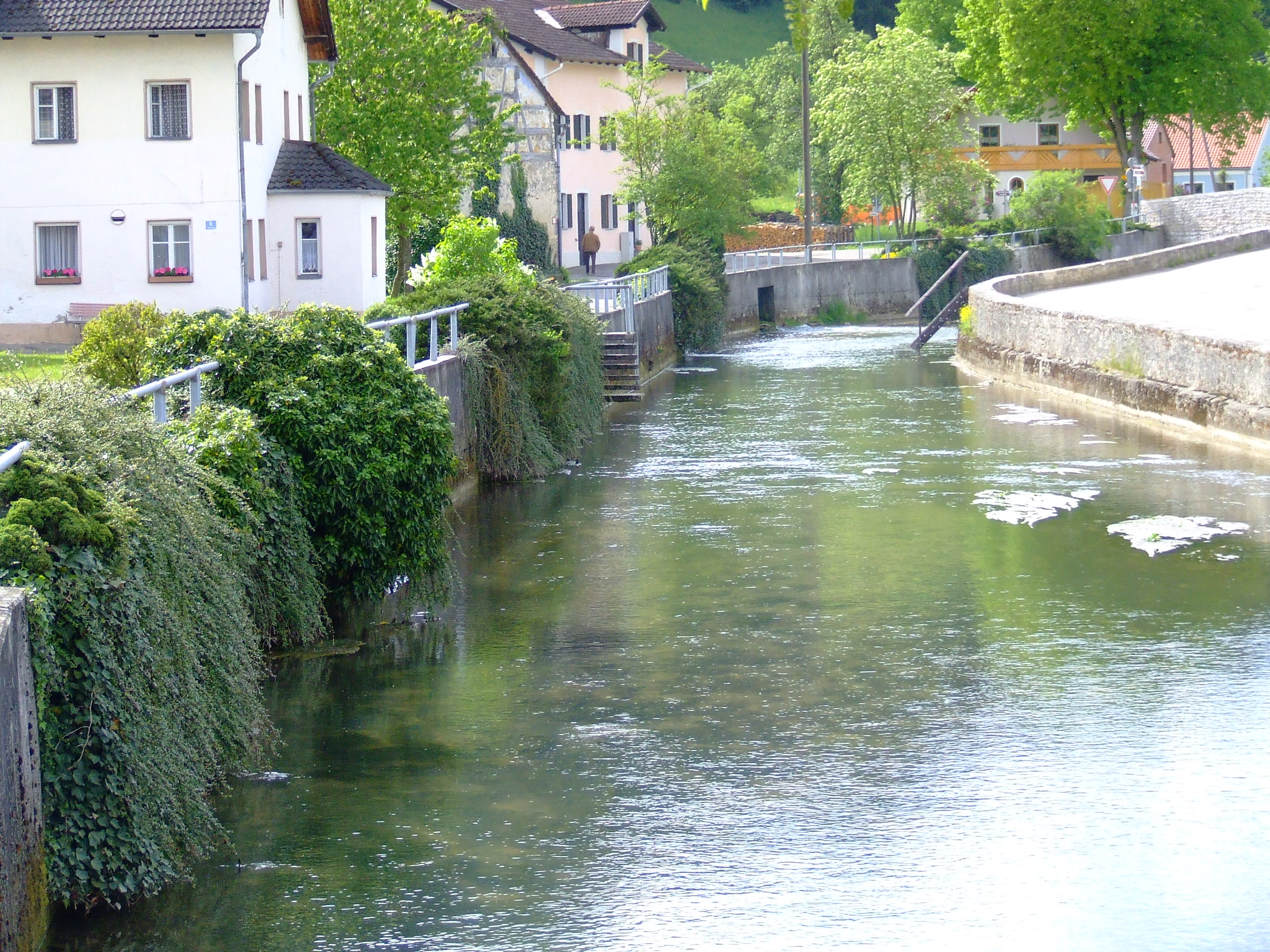 Die Gailach kurz nach der Quelle im Mörnsheimer Ortsteil Mühlheim